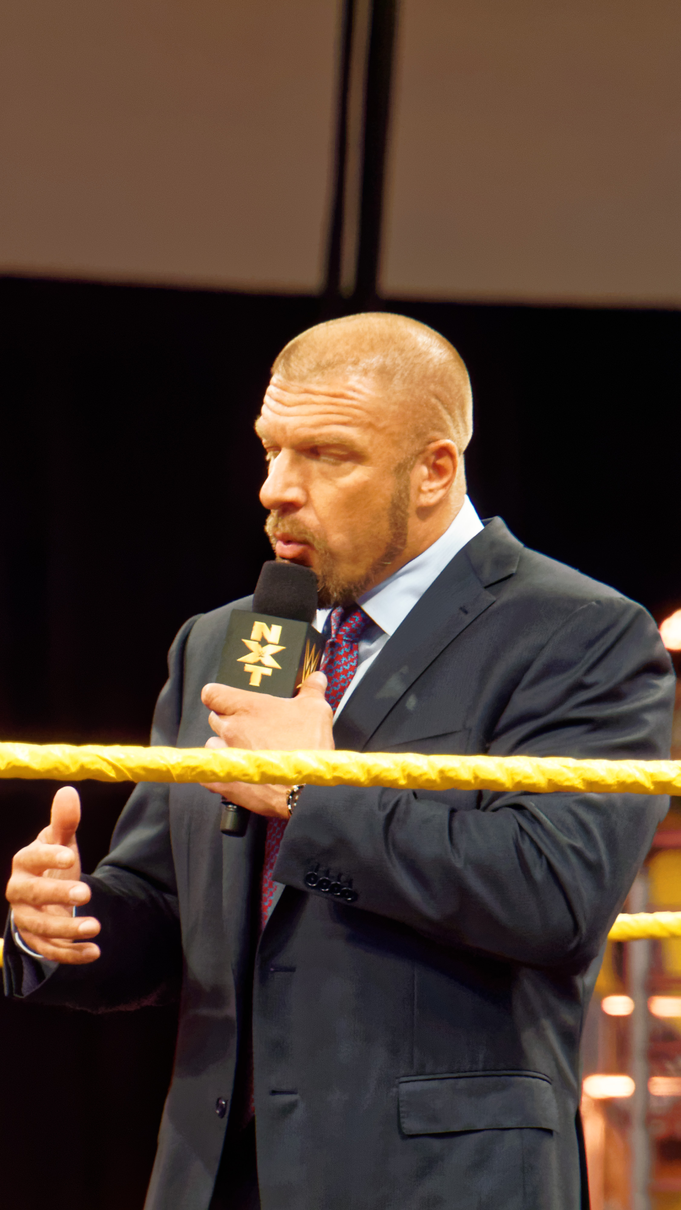 2015-03-26_20-24-01_ILCE-6000_2295_DxO